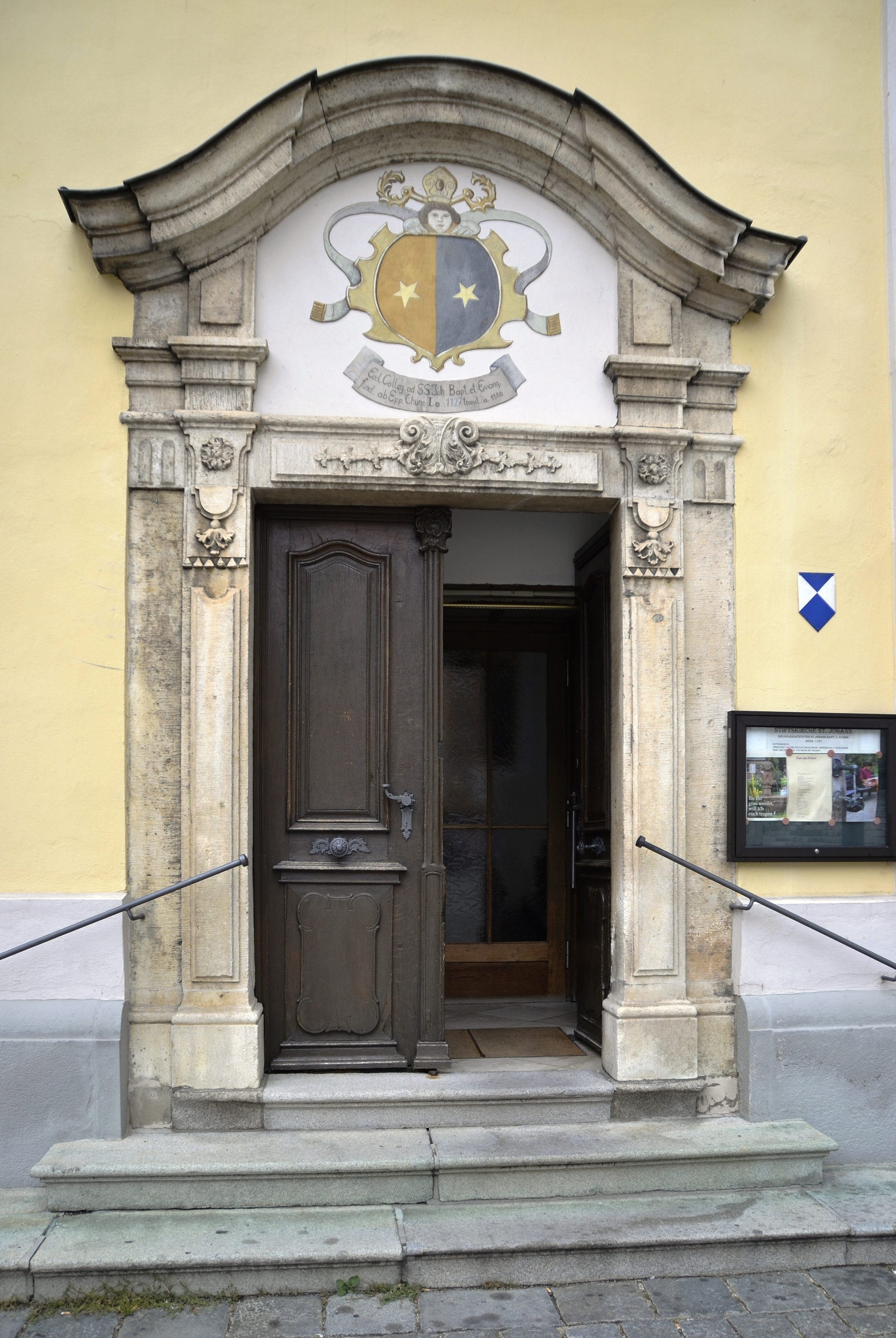 Das Eingangsportal der Stiftskirche St. Johann in Regensburg.